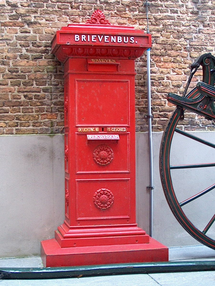 Oude Nederlandse PTT brievenbus; eigendom van Westfries Museum, Hoorn.